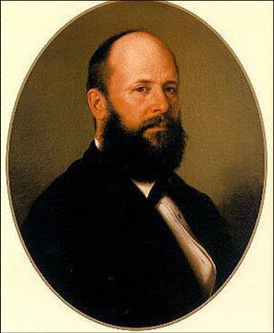 Portrait of Konstantin Vojnović.